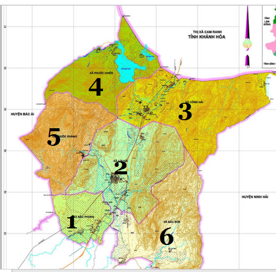 bđ